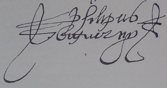 Firma de Felipe Biguerny. Tomada de una carta dirigida al entallador francés llamado Matías, de 17 de marzo de 1516.